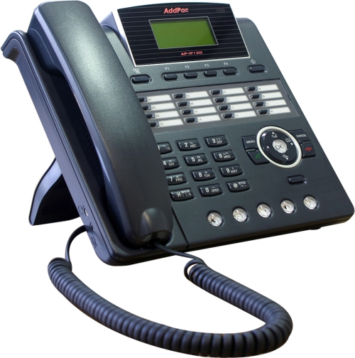 IP телефон AddPac AP-IP160